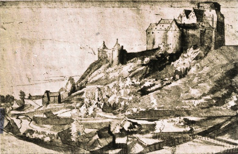 älteste bekannte Ansicht der Hardenburg: Lavierte Federzeichnung aus dem "Kurpfälzischen Skizzenbuch" (Staatsgalerie Stuttgart)